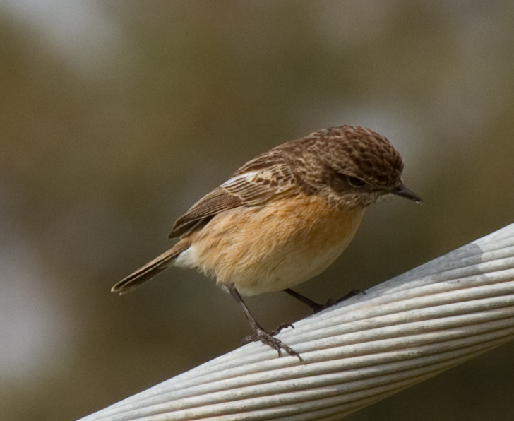 European Stonechat Saxicola rubicola, Malta